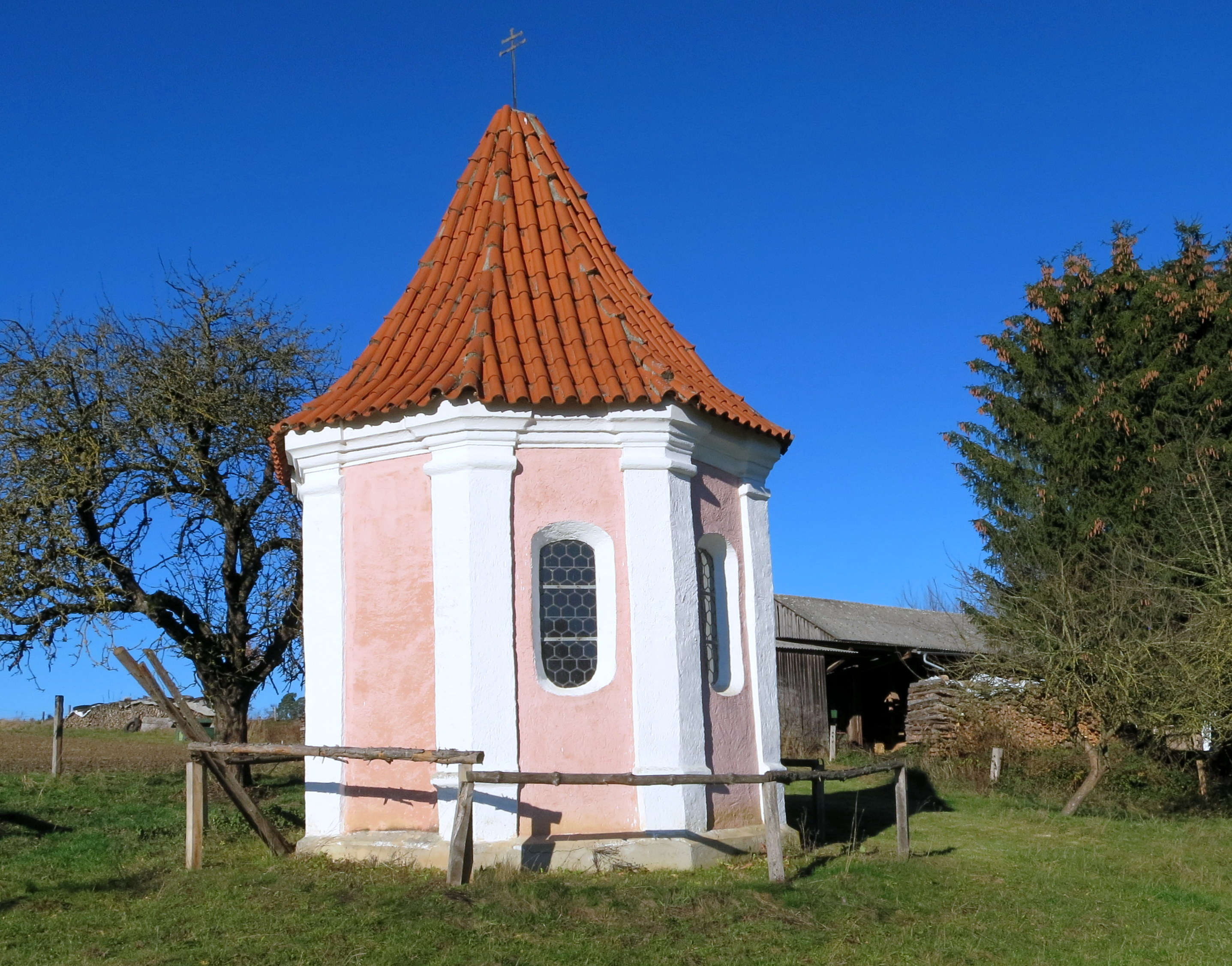 Barocker Zentralbau